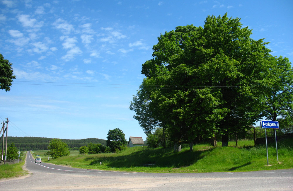 Беларуская (тарашкевіца): Моўчадзь